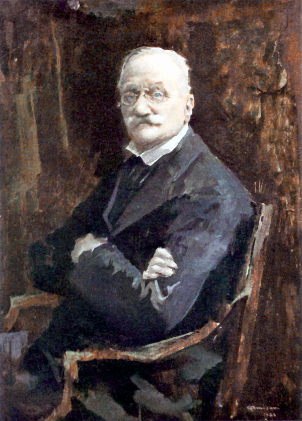 Arrigo Boito in un ritratto di Giuseppe Amisani (Milano, Conservatorio Giuseppe Verdi).